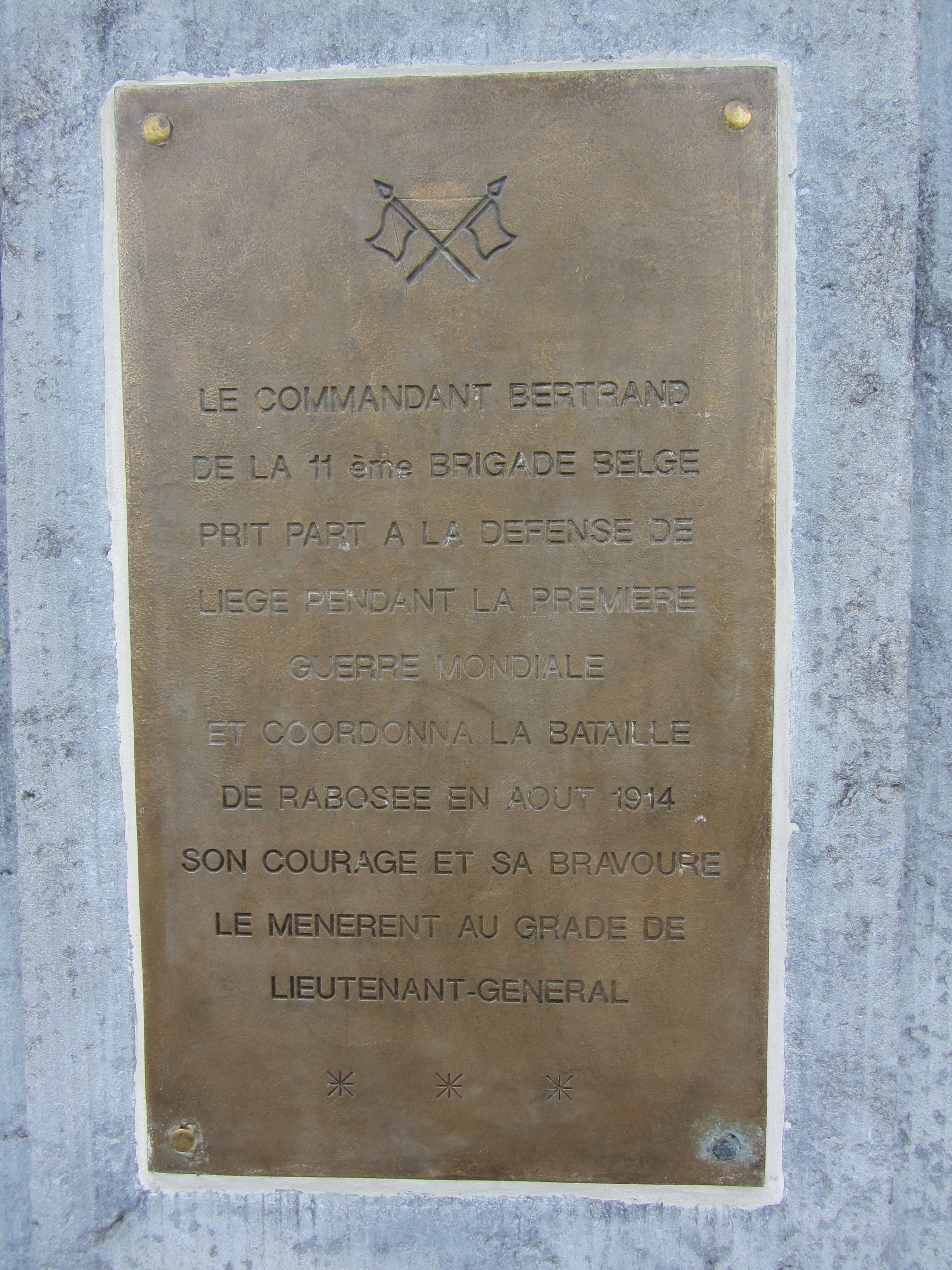 Monument du lieutenant général Joseph Bertrand place Théodore Gobert, près du pont d'Amercoeur à Liège, plaque commémorative sur le socle.